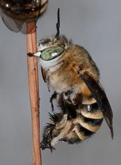 Amegilla sp. (probably A. albigena) Palermo